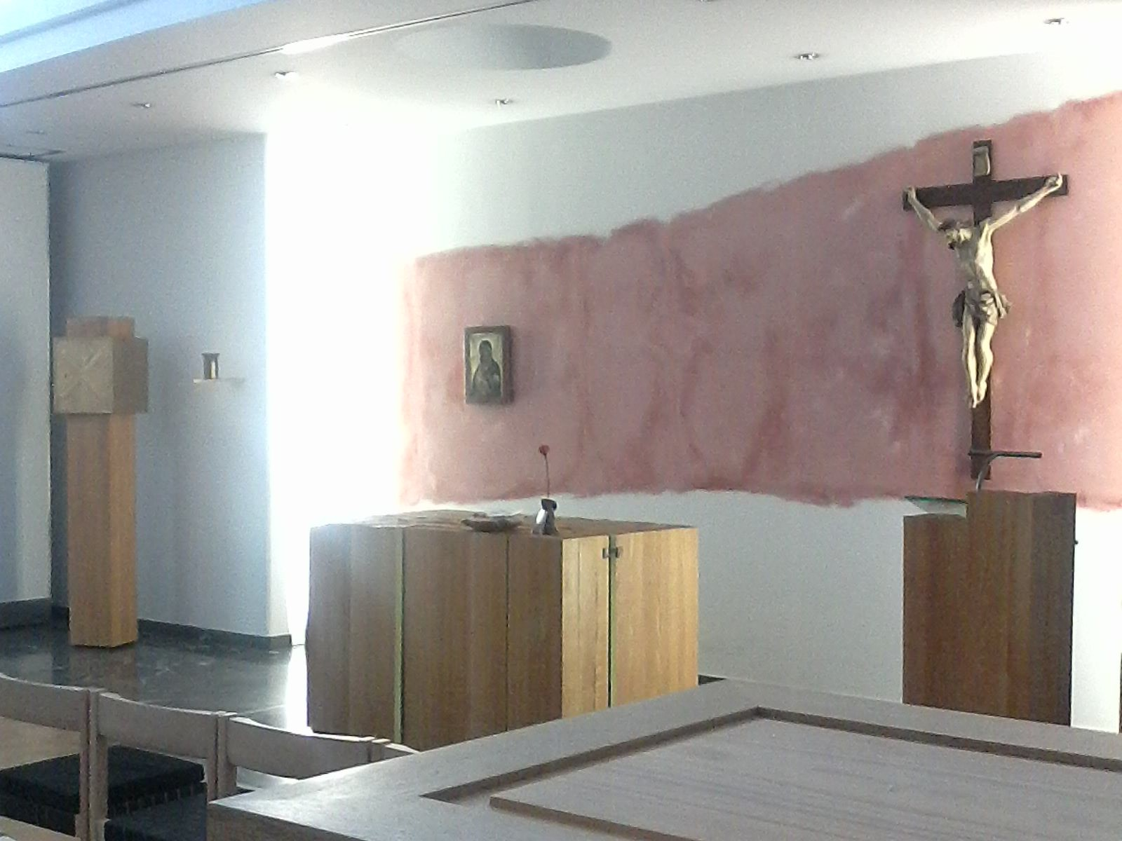 Sana Klinikum Hof, Eppenreuther Straße, Hauskapelle im 2. Stockwerk